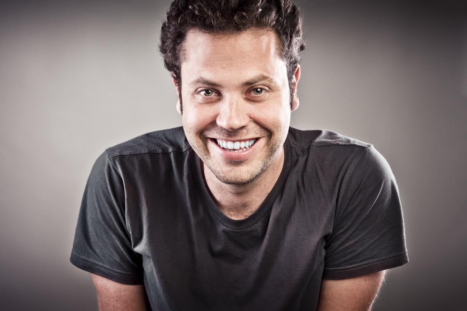 אלי ביז'אווי